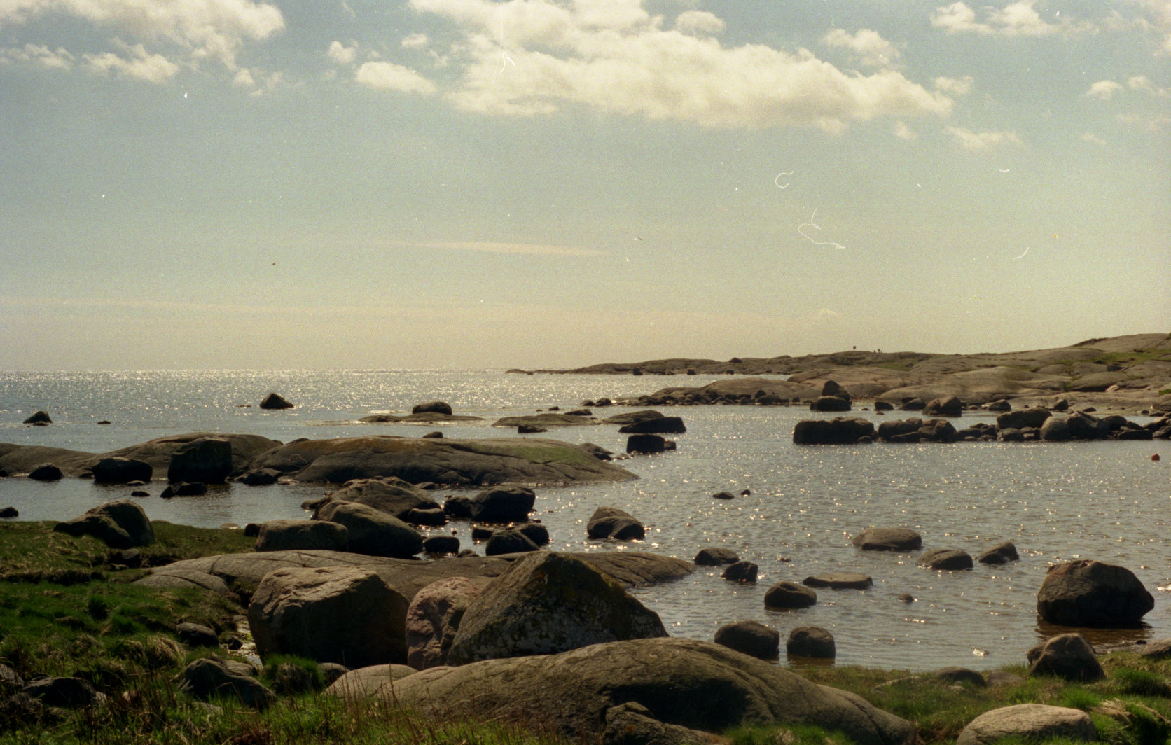 Tredje vik på Getterön. Datumet är ungefärligt men bör vara 1997-2000.